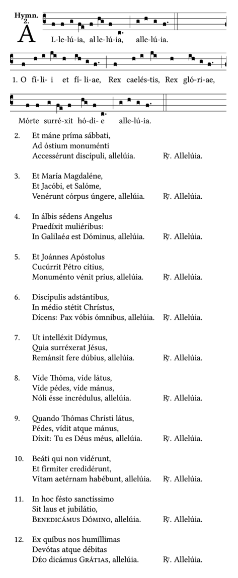 Hymnus paschalis O filii et filiae